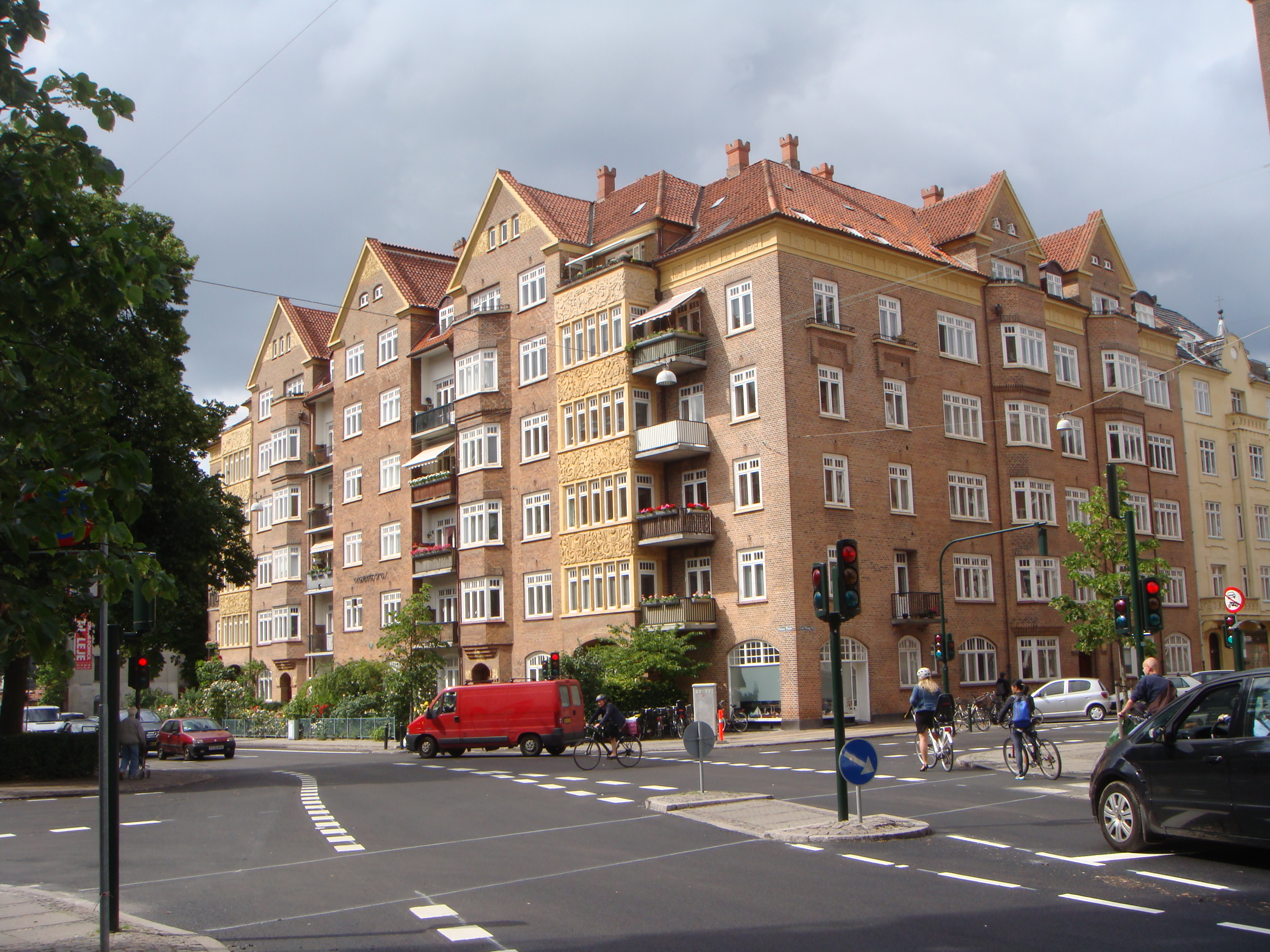 I've always loved the frieze patterns on the outside of this building. They don't make them like they used to... Located on Danasvej, Frederiksberg, Denmark. Beboelsesejendommen Vodroffshus, Svend Trøsts Vej 12/Danasvej 22-24/Carl Plougs Vej 7, opført 1908, arkitekter Ulrik Plesner og Aage Langeland-Mathiesen, ornamentik af Thorvald Bindesbøll.